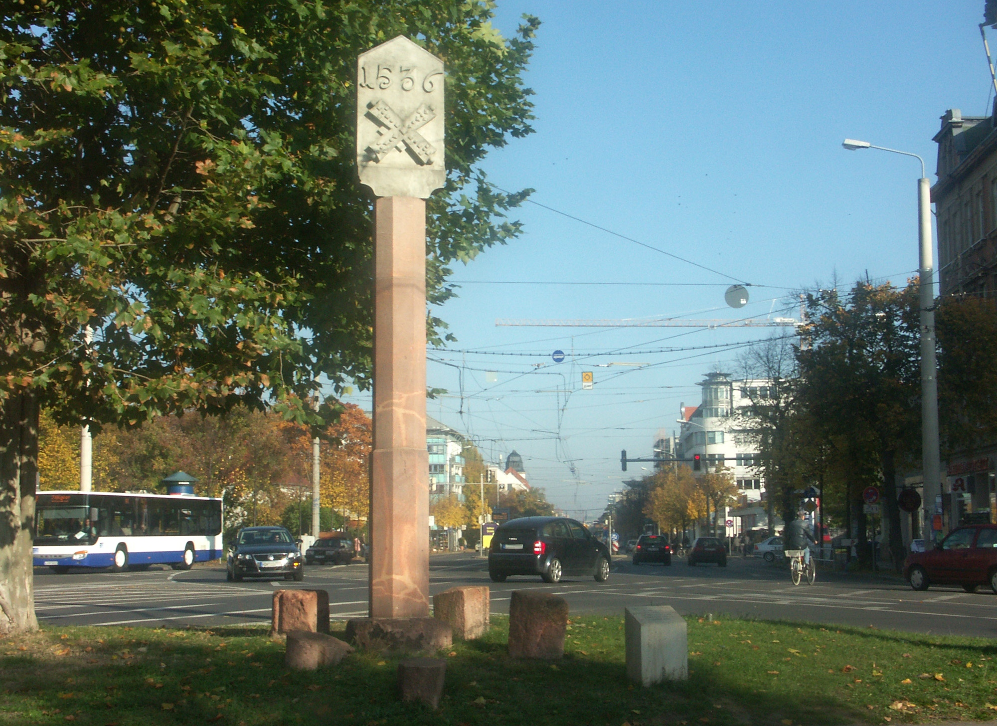 Connewitzer Kreuz (Kopie von 1994, Anfertigung Markus Gläser, Original im Stadtgeschichtlichen Museum)